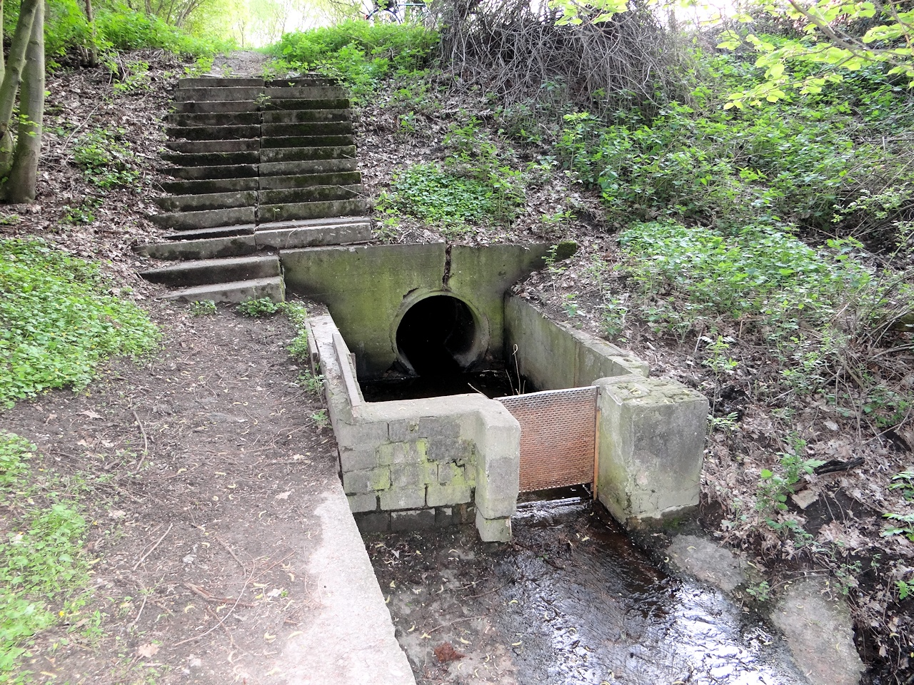 Neuer Graben, hier der Abfluss der unteren Fischteiche im Raffteichgebiet, Blickrichtung Westen.